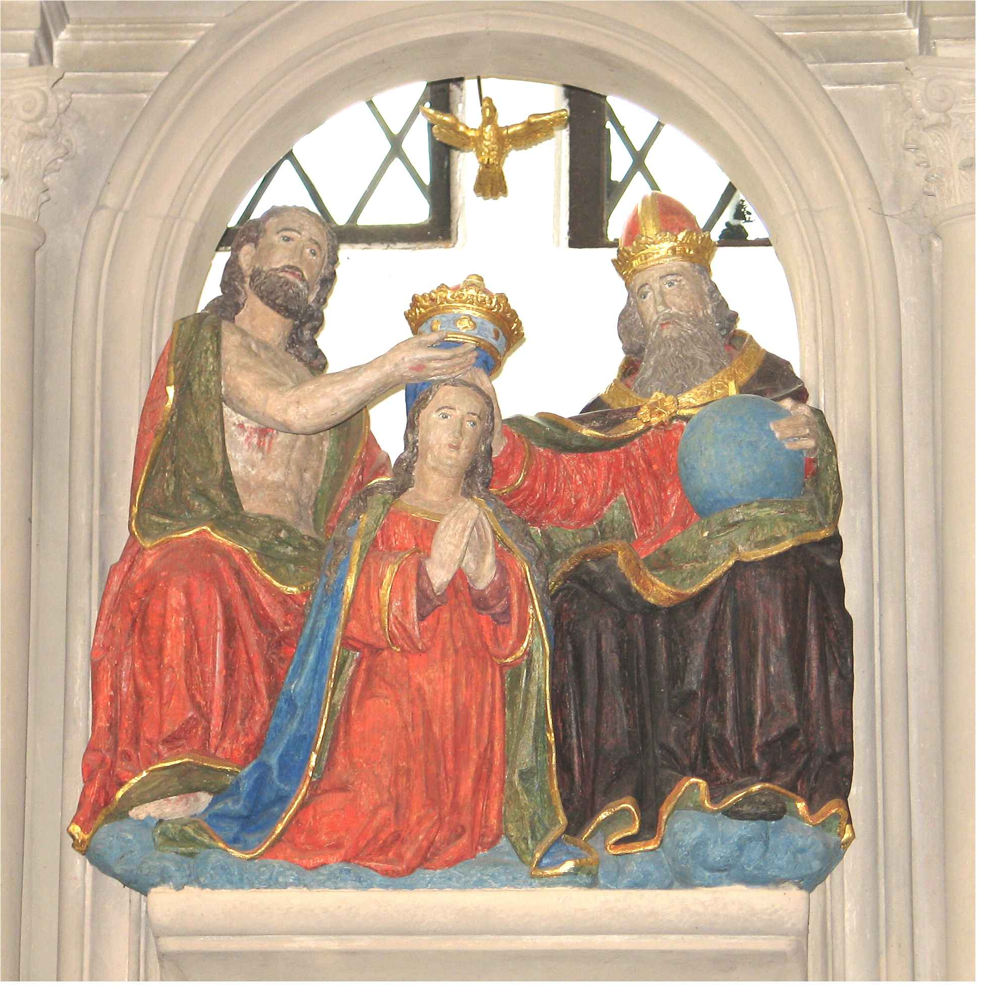 Statuen um lënke Säitenaltor an der Kapell op der Giischterklaus. Kategorie:Gemeng Rouspert Giischterklaus